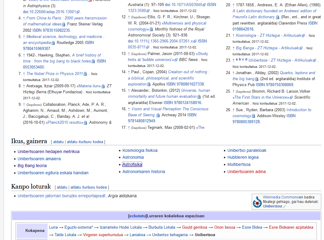 Testu antolatzaileak: buletak eta zenbakiak.